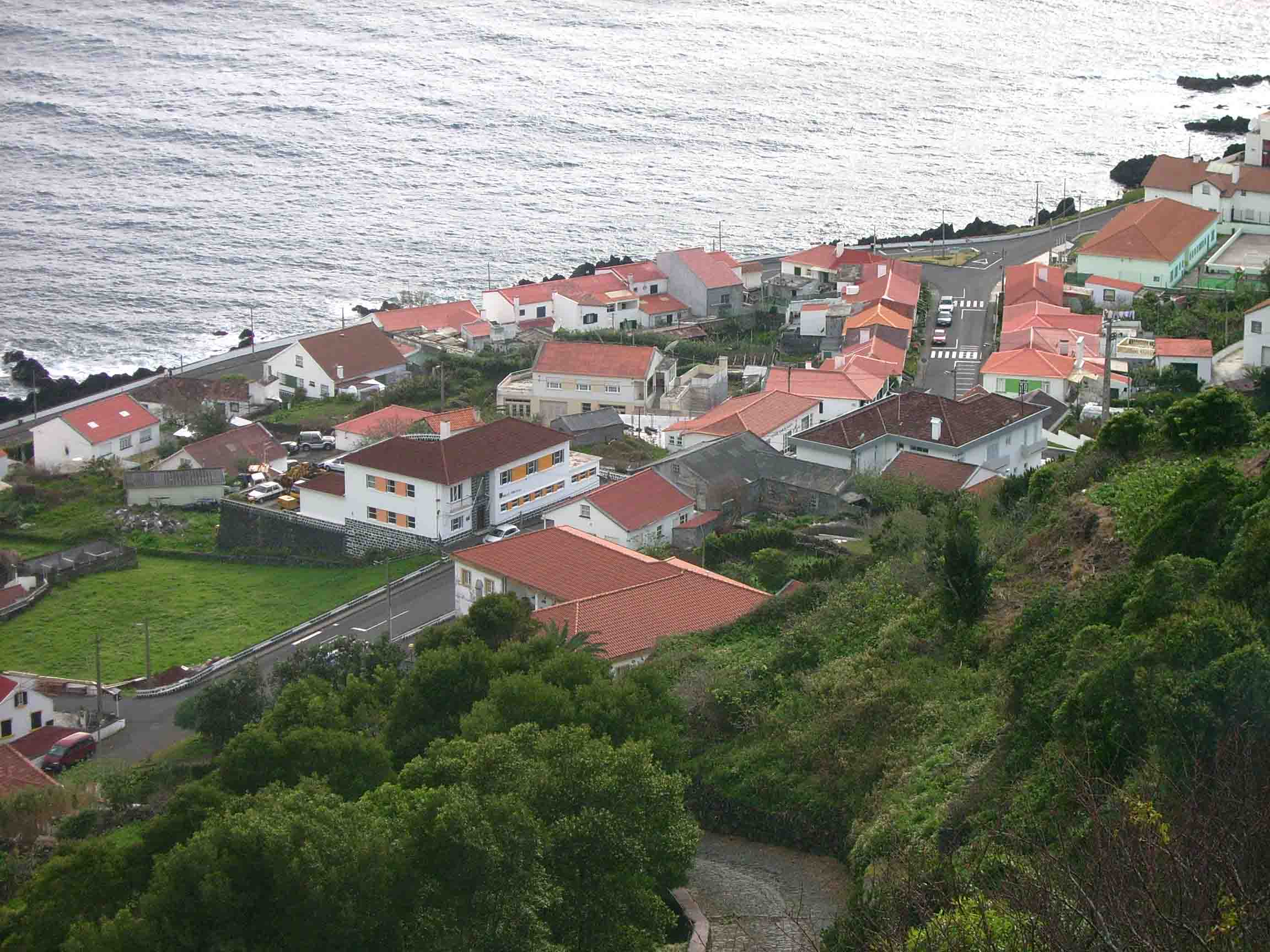 Vista parcial da vila da Calheta, ilha de S. Jorge, Açores, Portugal